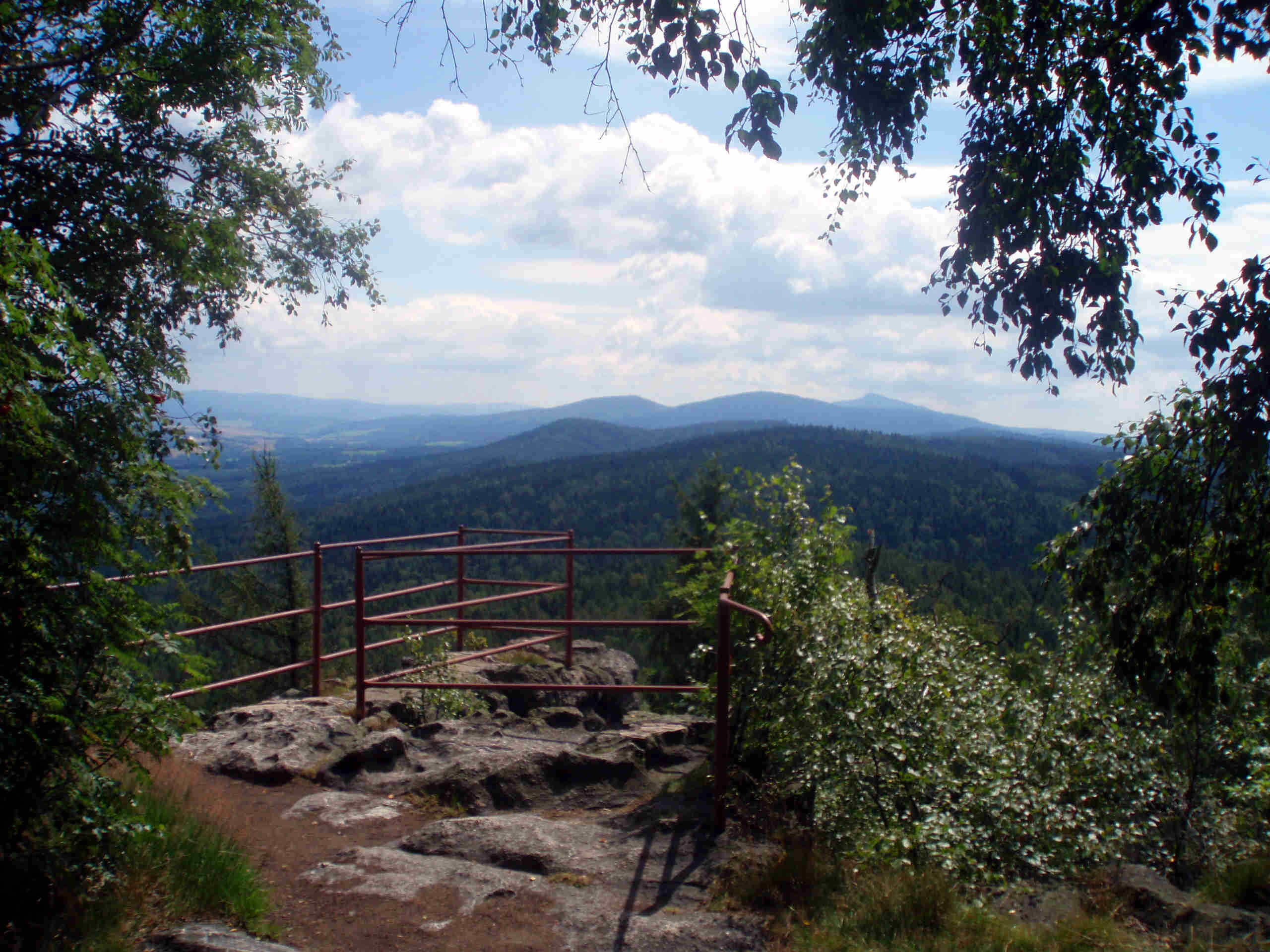 Heraufziehender Regen an der Böhmischen Aussicht